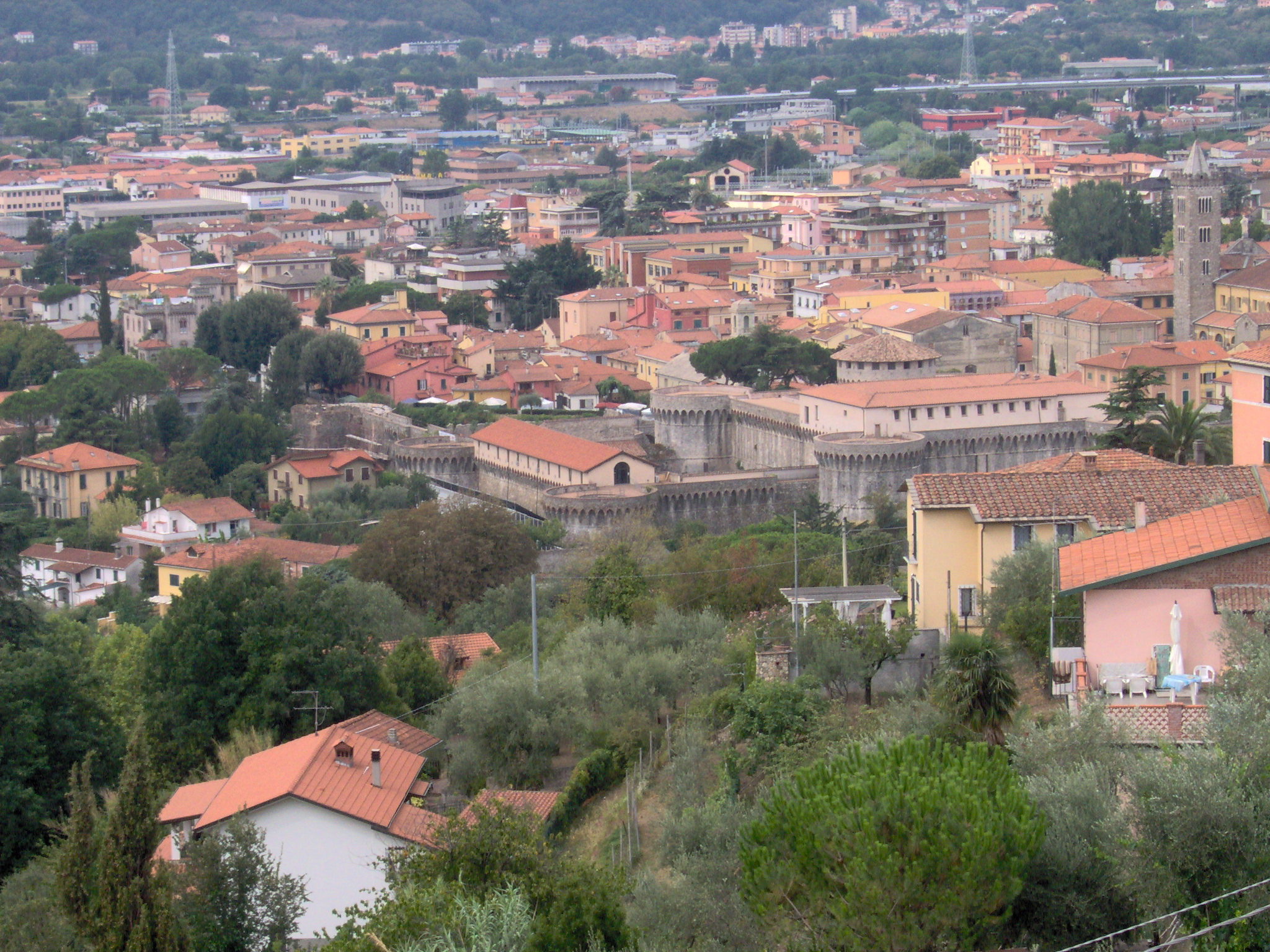 foto provincia spezia